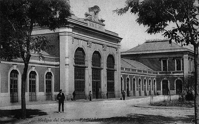 Estación de FFCC - Medina del Campo (Valladolid) - Papelería Ricardo Sendino. Ymaer - Reus. Fachada de la estación de ferrocarril. - Tarjeta postal. Papel 139 x 88 B/N